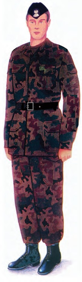 Ubiór polowy funkcjonariuszy noszących umundurowanie SP z mundurem polowym oraz z furażerką